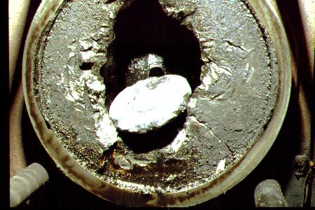 Motorschaden VW Kaefer 03